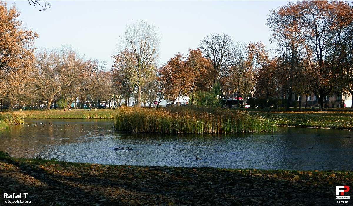 Staw w miejscu przedwojennego toru kolarskiego.